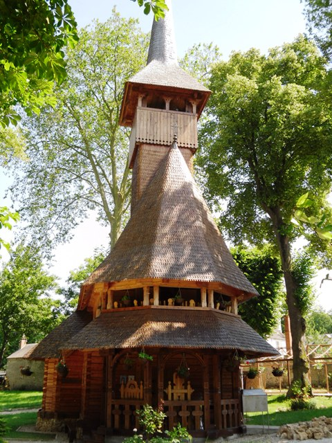 Église de la Synaxe-de-la-Mère-de-Dieu-et-du-Saint-Prophète-Élie, église orthodoxe roumaine de Limours (91)